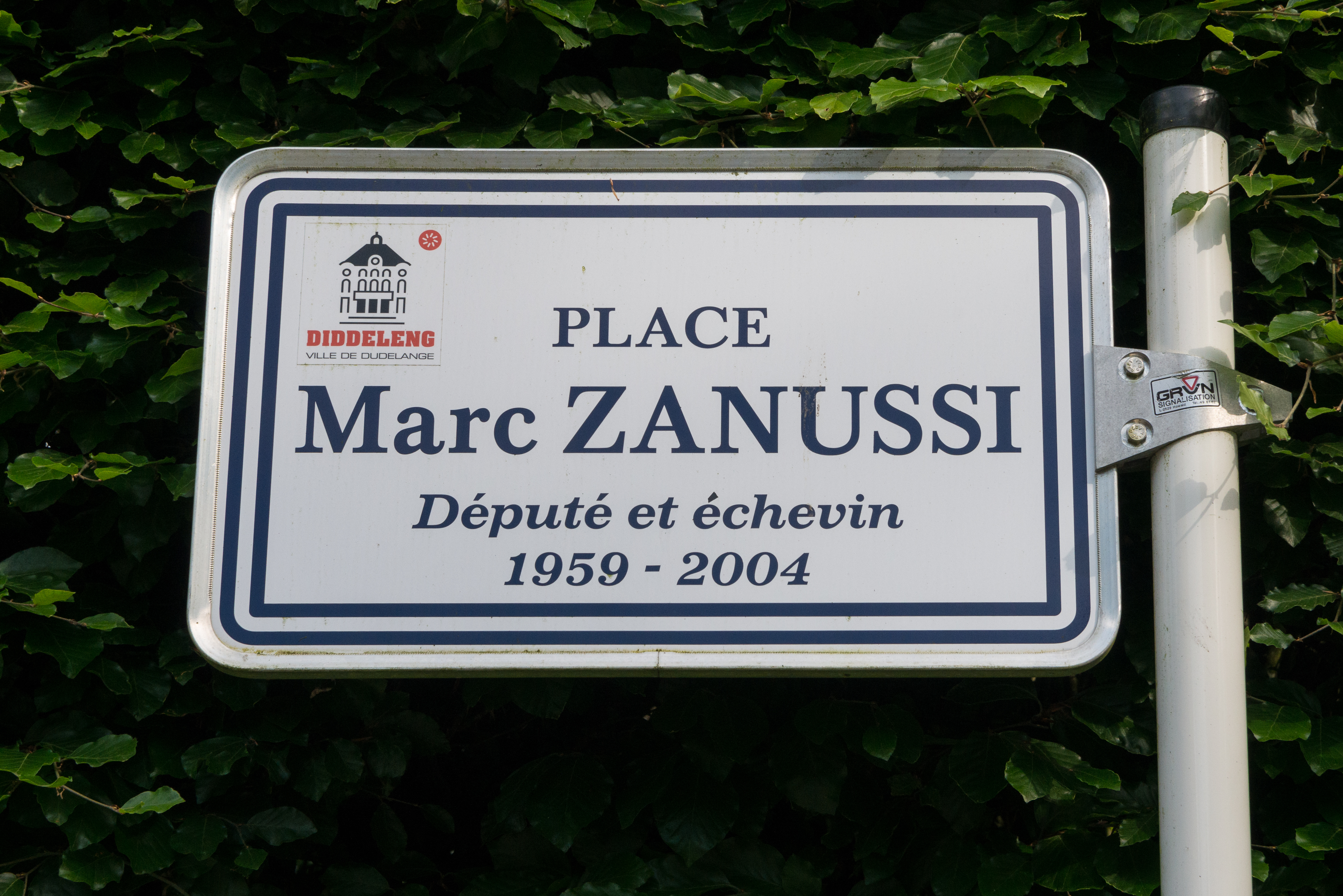 Stroosseschëld zu Diddeleng.